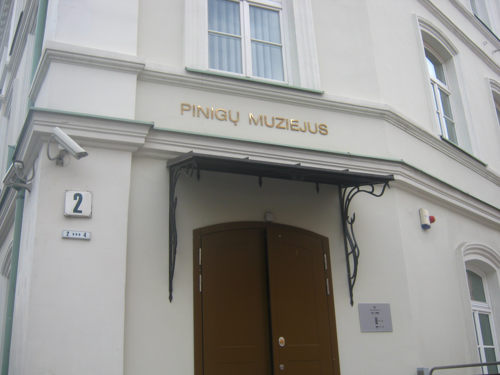 Pinigų muziejus, Vilnius